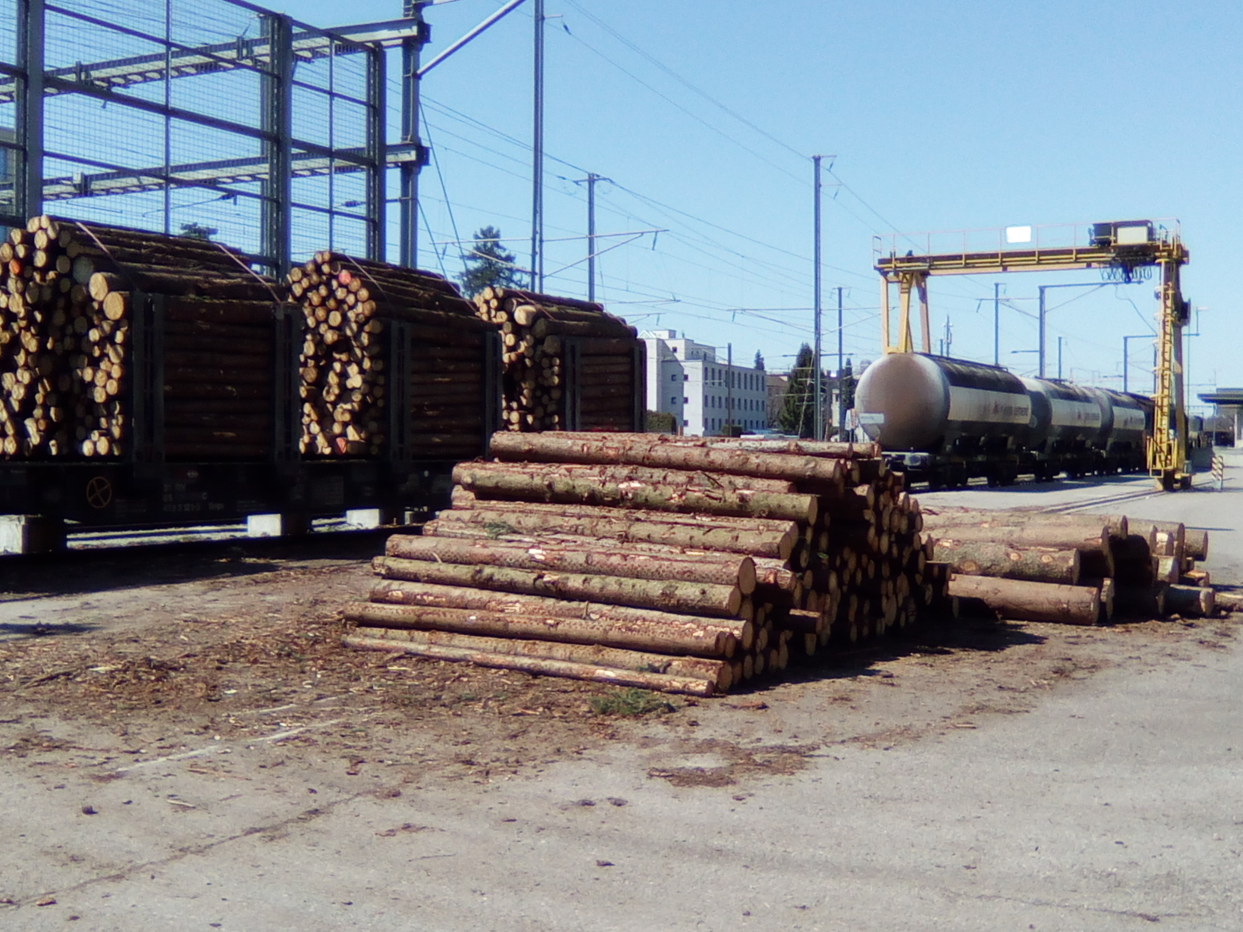 Bahnhof Wetzikon ZH Schweiz Rundholz